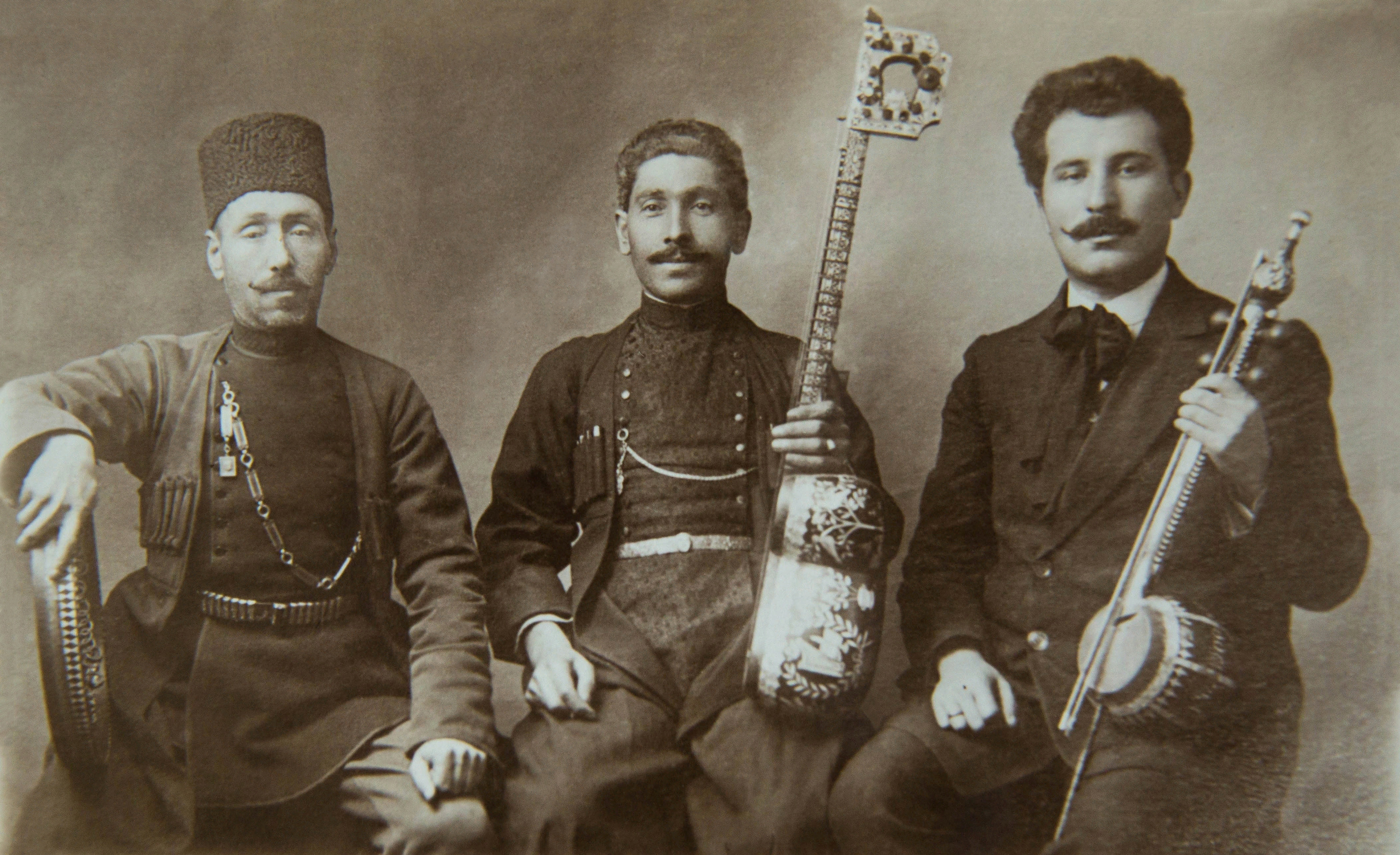 Ансамбль Кечачи оглы Мухаммеда. 1912 г. Варшава. Слева направо: Кечачи оглы Мухаммед. Гурбан Пиримов, Саша Огансзашвили.